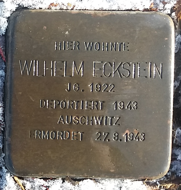 Stolperstein für Wilhelm Eckstein, Mitglied der Großfamilie Eckstein, Vöhringen (Iller)